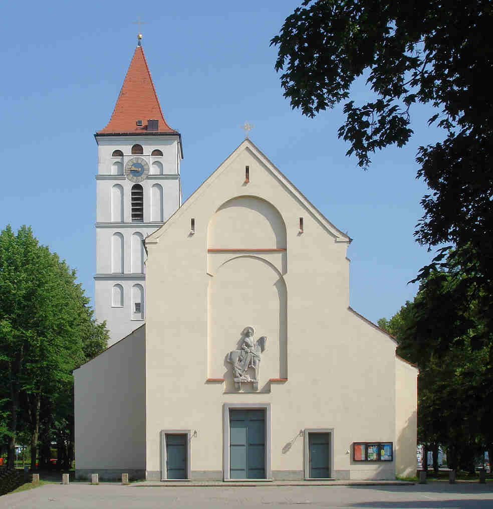 Neue Pfarrkirche St. Martin, Moosach, München